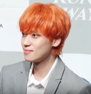 4일 오후 3시 서울 강남구 압구정 일지 아트홀에서는 틴탑의 새 앨범 ‘DEAR. N9NE(디어나인)’ 발매 기념 프레스 쇼케이스가 진행됐다.